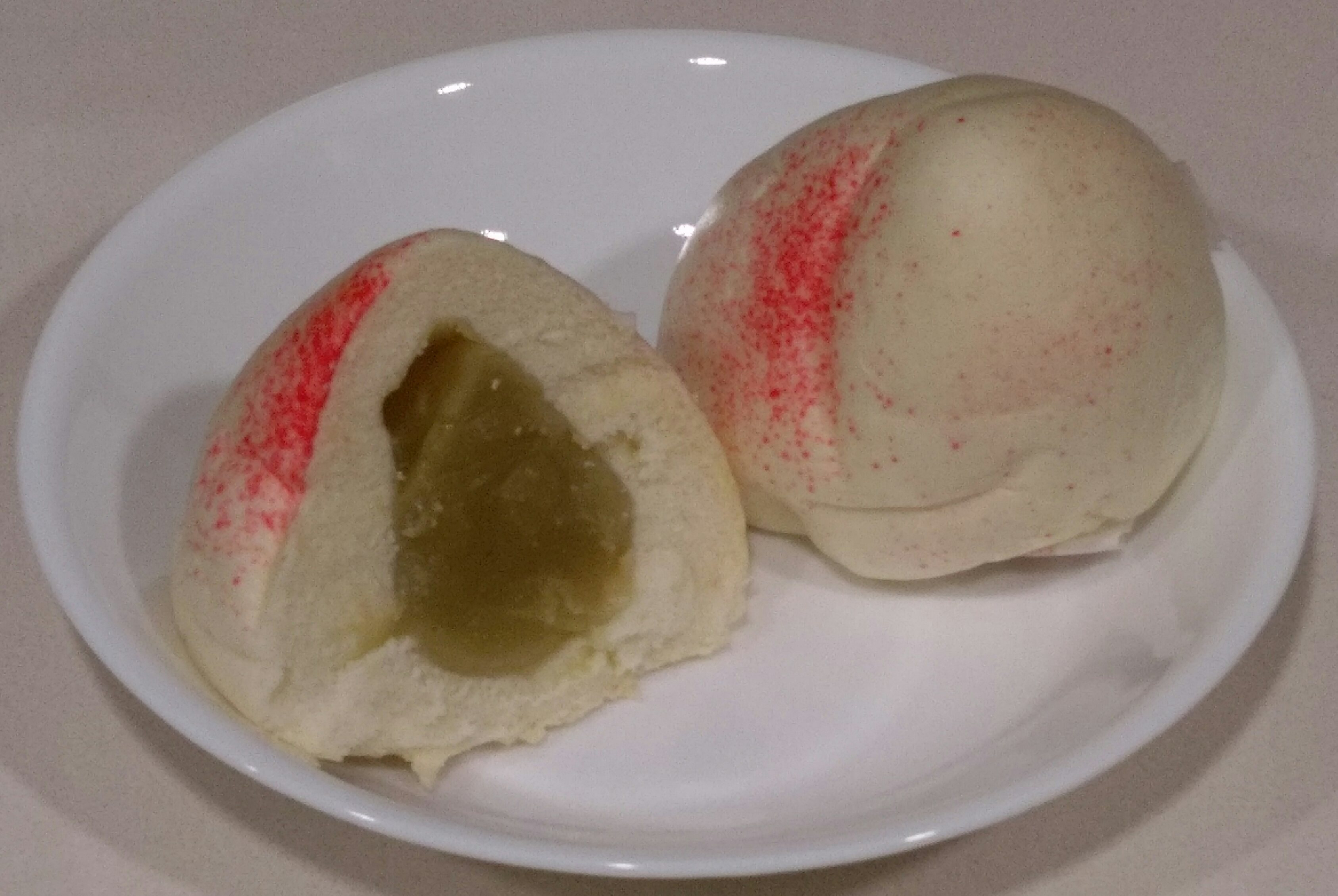 中文（台灣）: 糕餅店製作的蓮蓉餡壽桃包